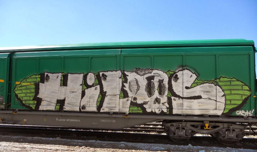 Graffiti. Pieza de "Hilos". España